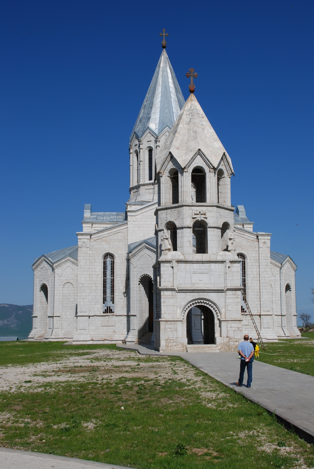 Eglise de Shushi